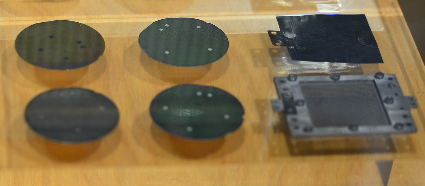 GLAM im Deutschen Museum Bonn, Mesa Schablonen zum Aufdampfen mit quadratischer Verschiebemaske einer dünnen Kontaktschicht auf das Germanium. Auf einem Germaniumplättchen von etwa 2cm Durchmesser haben 500 Mesa-Transistoren Platz